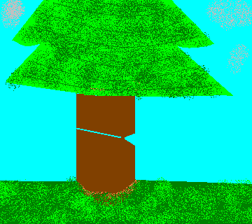 Motorsag/ Trefelling: Styreskjær og hovedskjær Det er mitt (ThorRune) eget bilde, jeg tegna det selv.